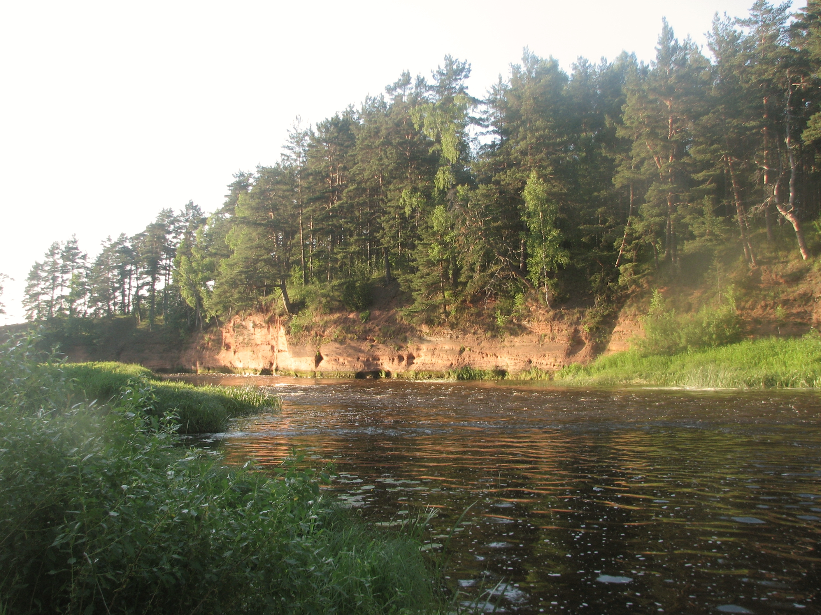 Pietraga Sarkanās klintis